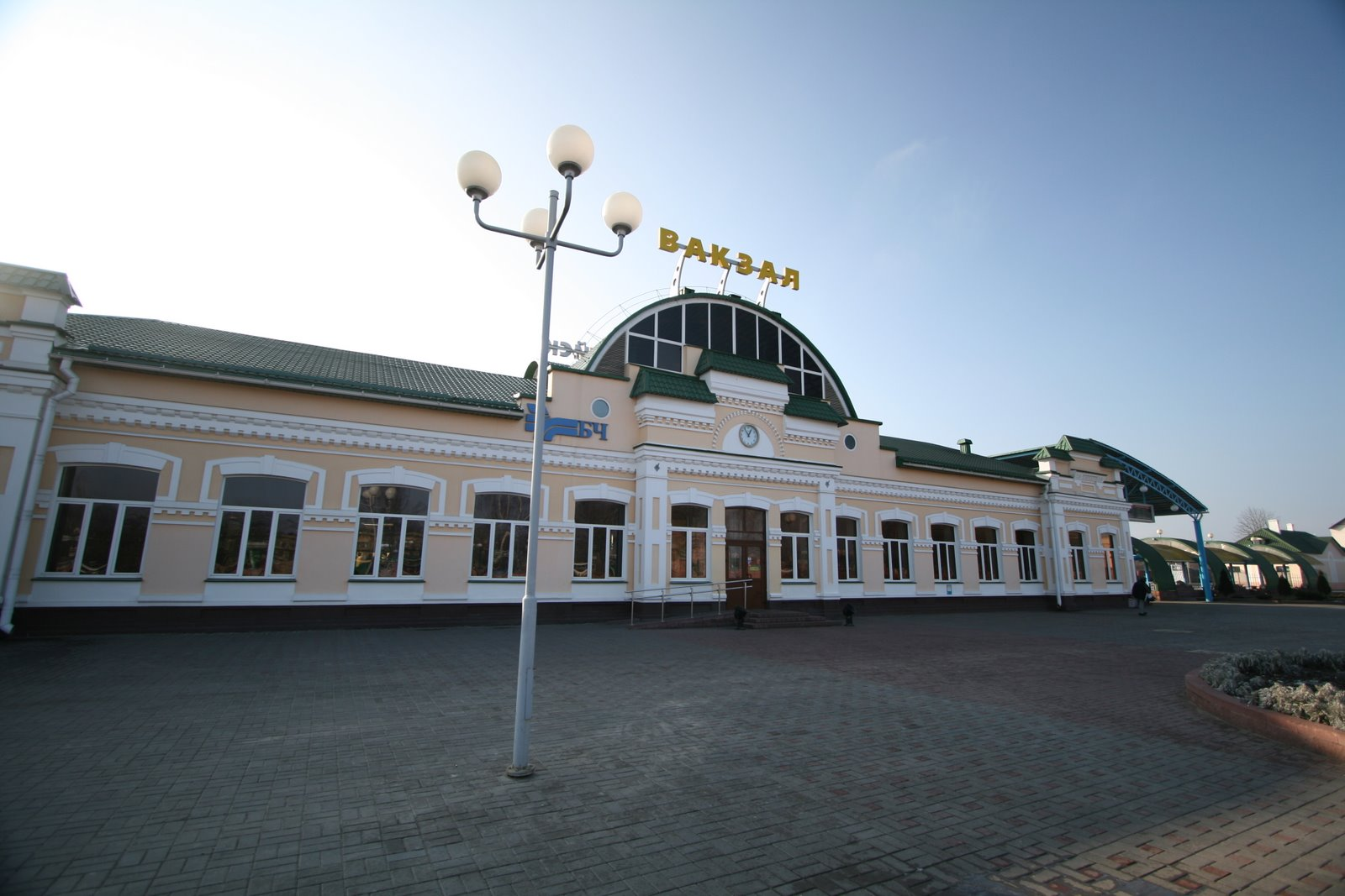 Babruysk